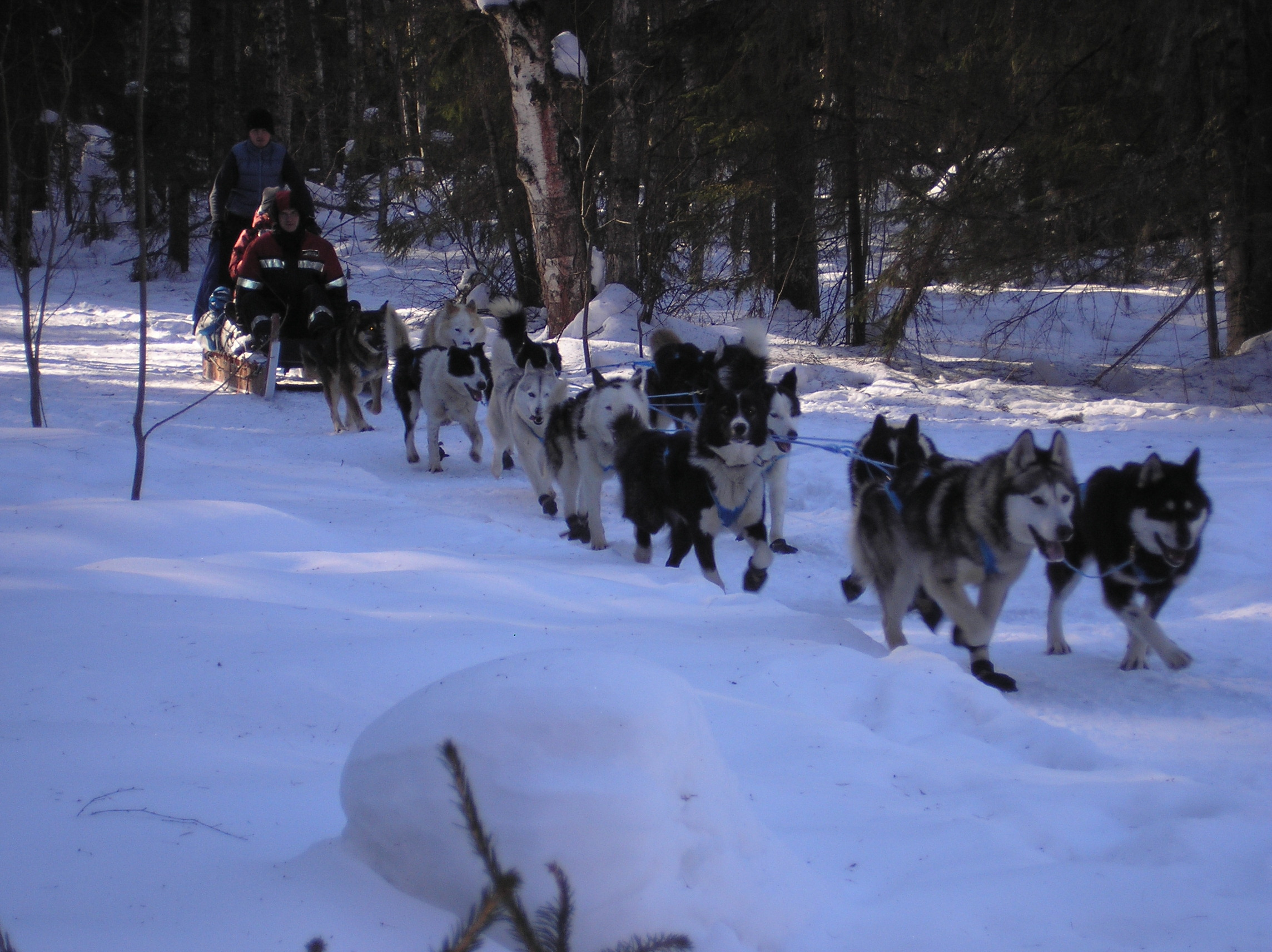 Тренировка ездовых собак и экпедиционных нарт перед походом на Северный полюс. Тренировочная трасса турбазы "Скифы Тур"